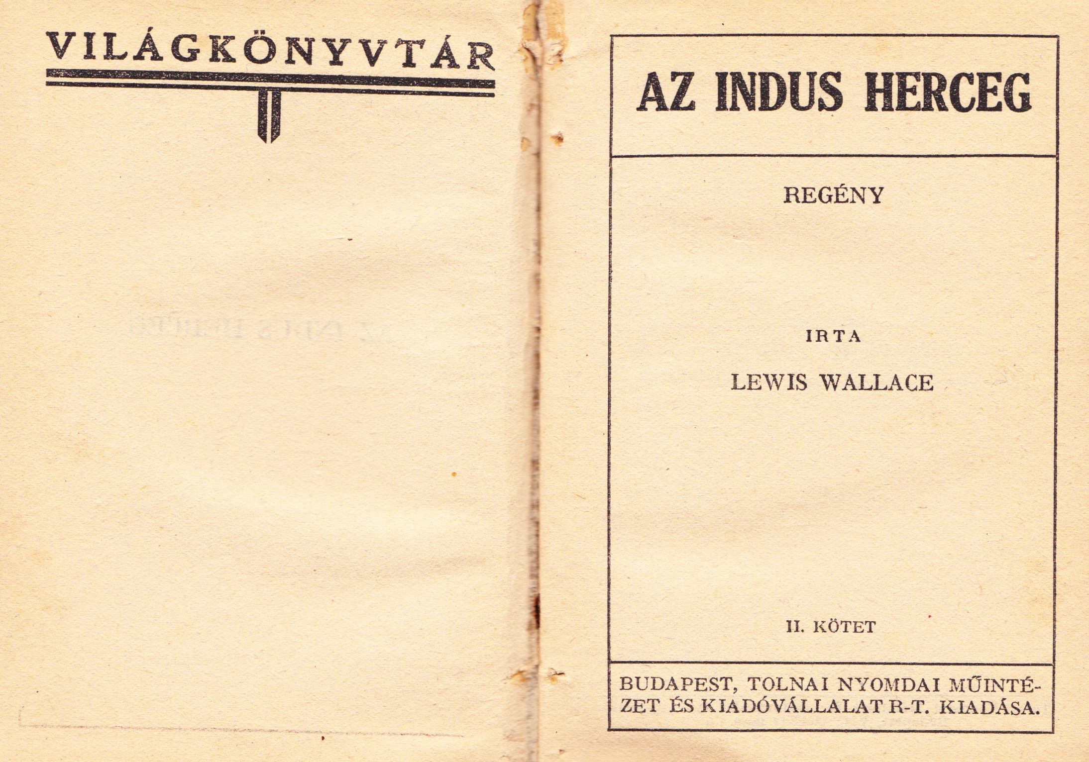 Lewis Wallace (1827-1905): Az indus herceg (1930-as évek)